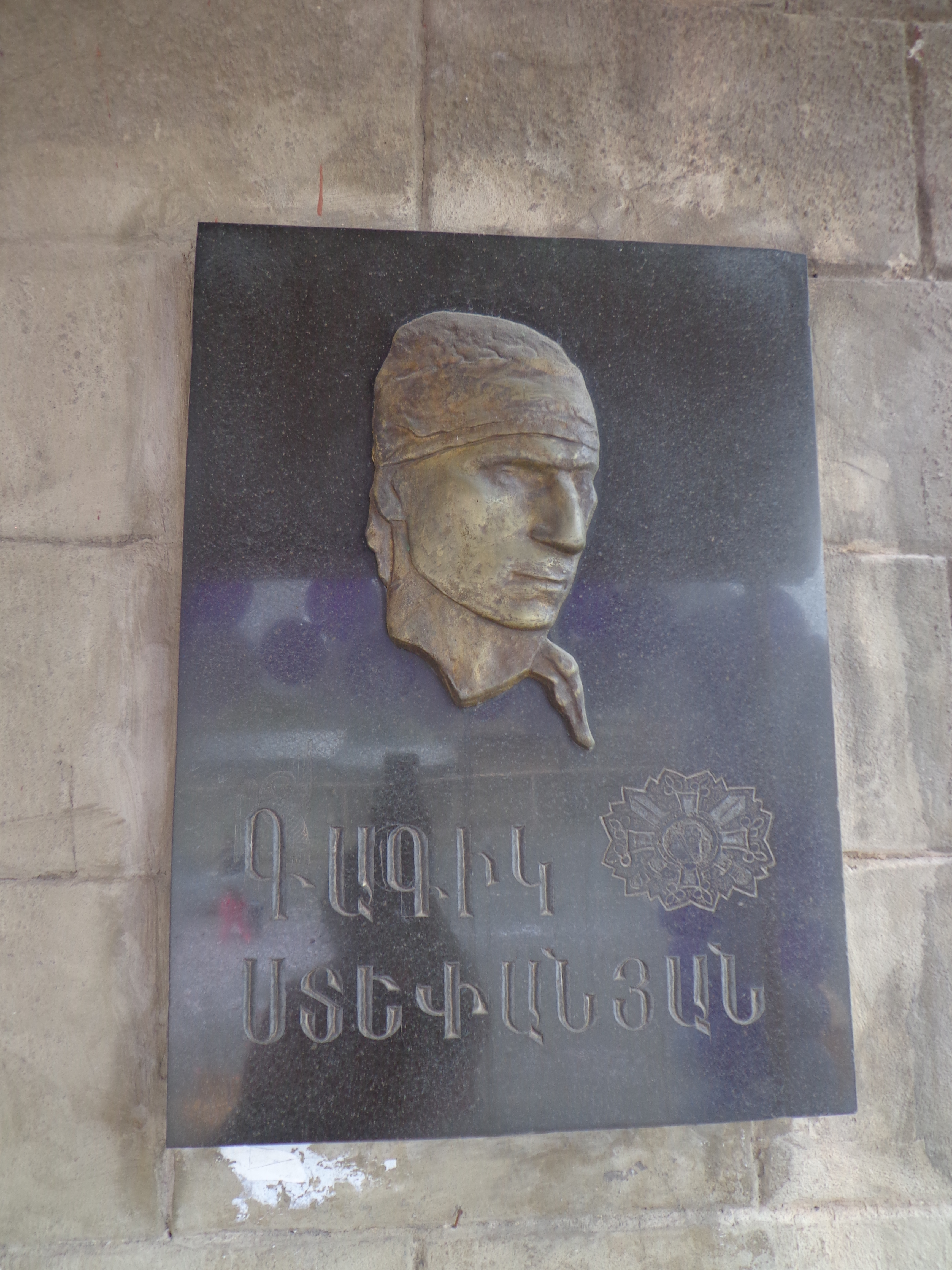 Գագիկ Ստեփանյանի հուշատախտակն իր անունը կրող 135 հիմնական դպրոցի պատին